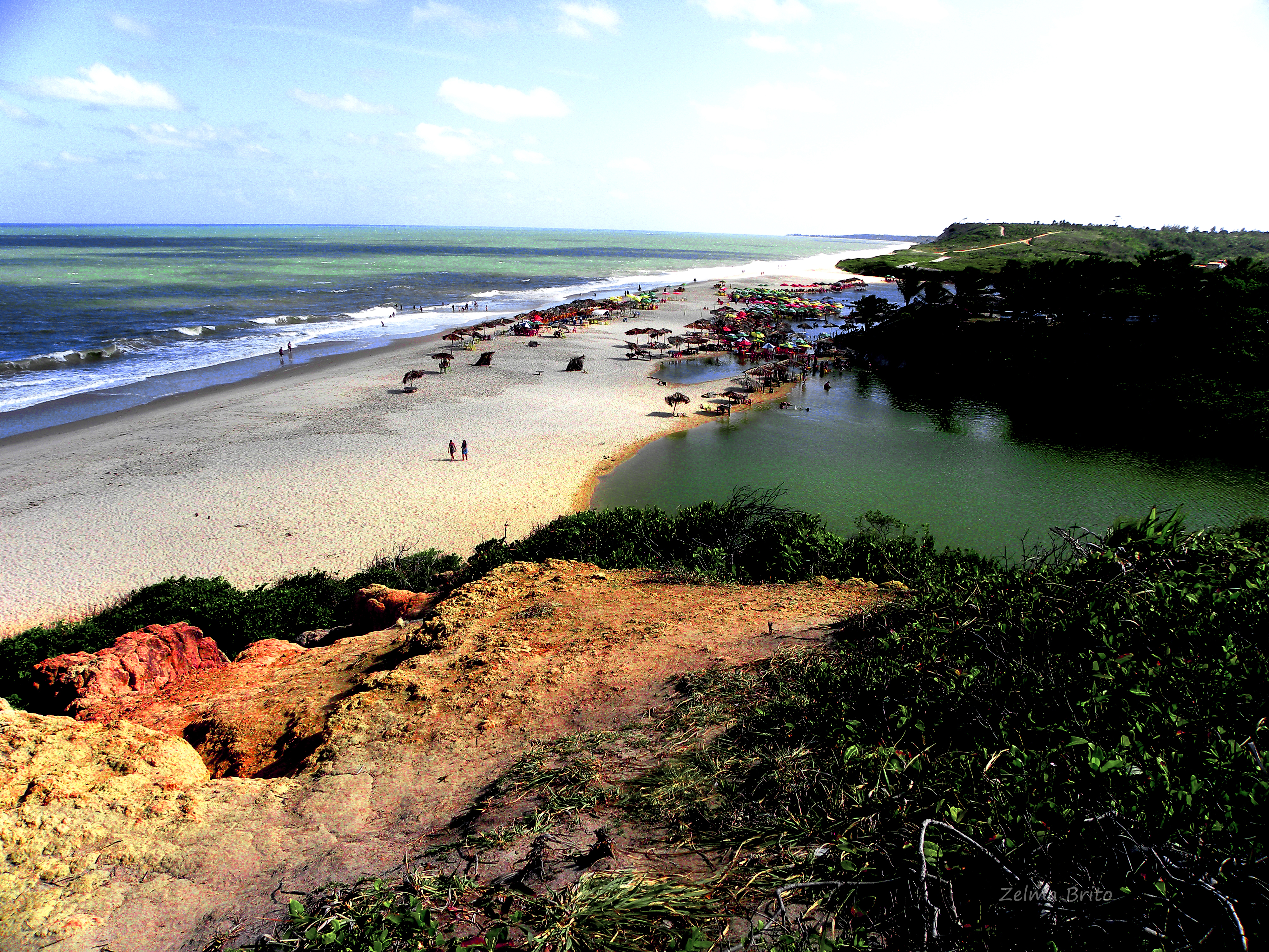 Praia Bela - Paraíba